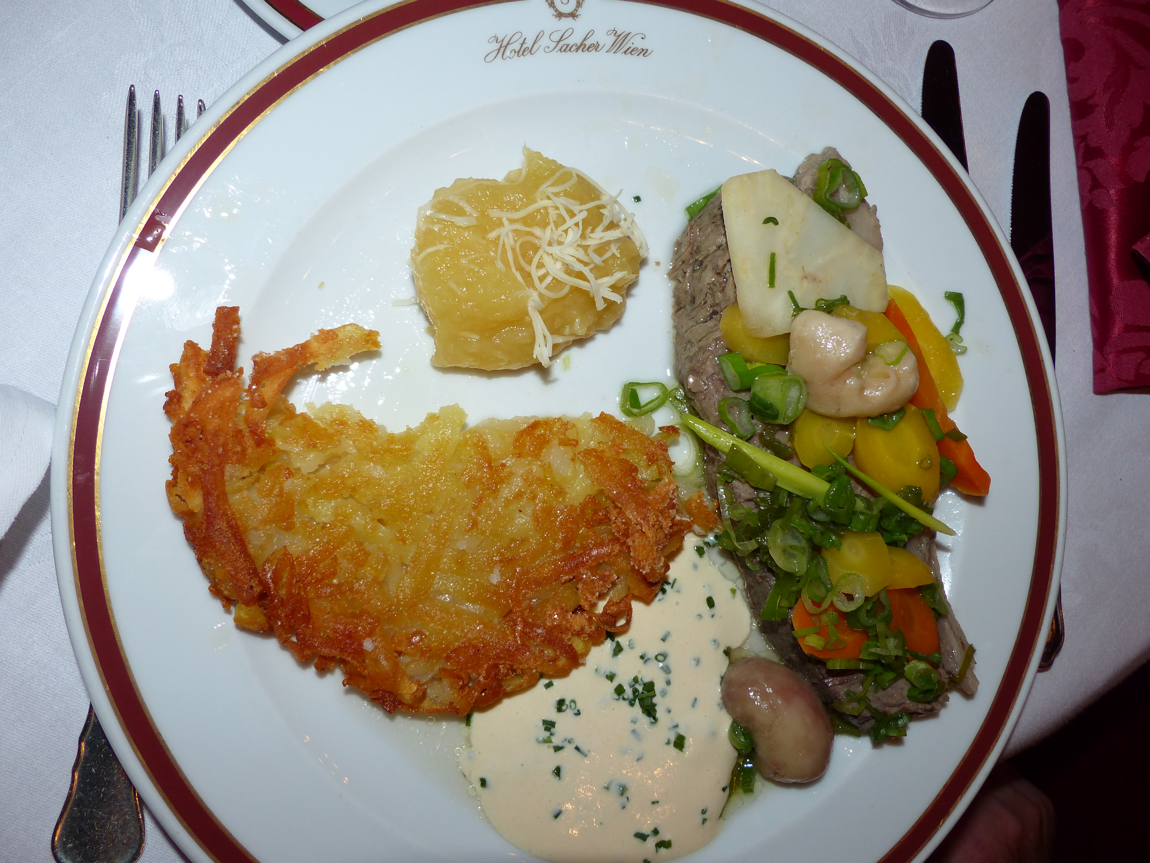 Sacher Tafelspitz mit Apfelkren, Schnittlauchsauce und Erdäpfelschmarrn, Restaurant Rote Bar, Hotel Sacher in Wien